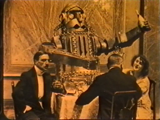 Description